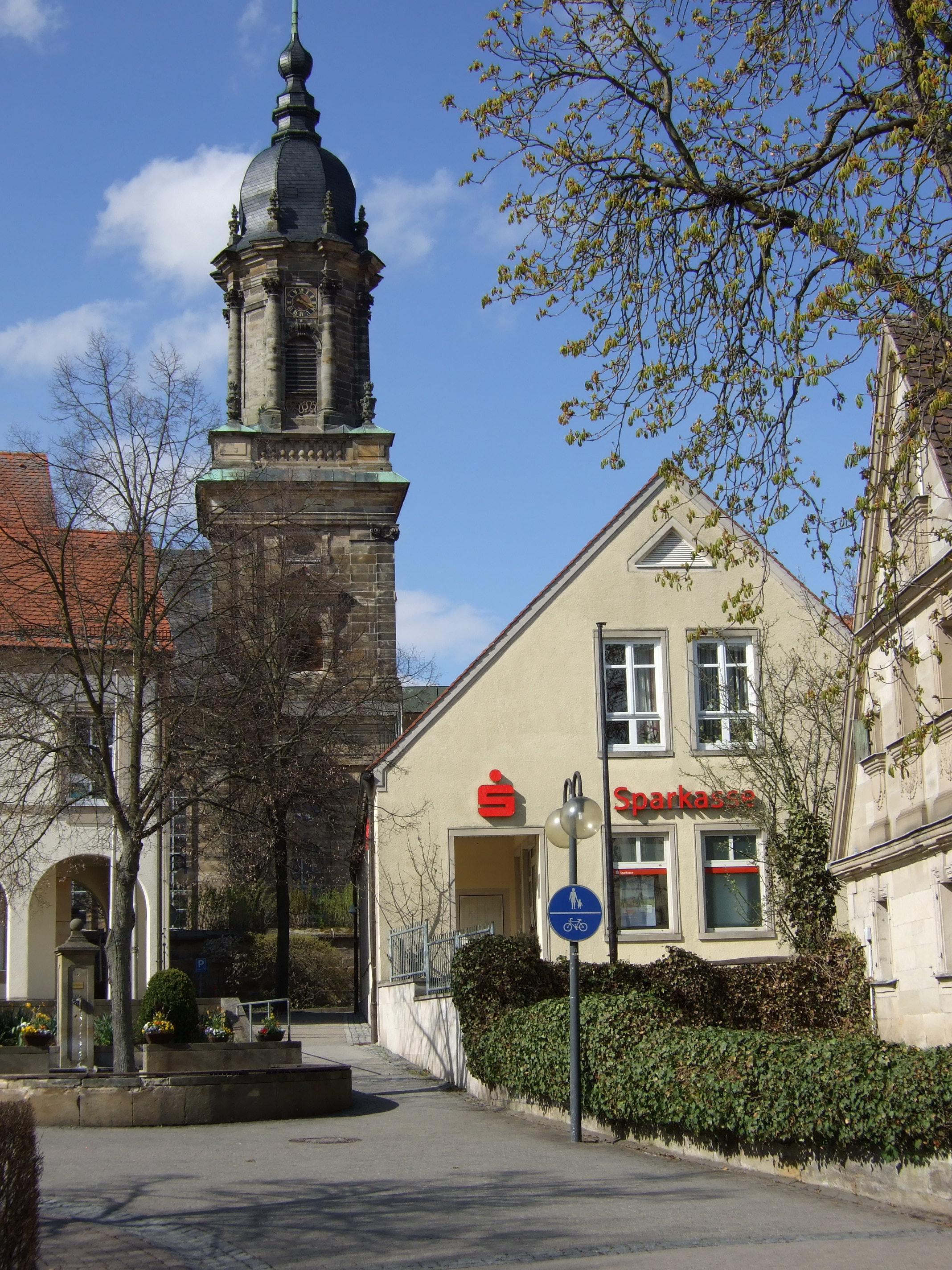 Bindlach, Ortskern (Rathausplatz)